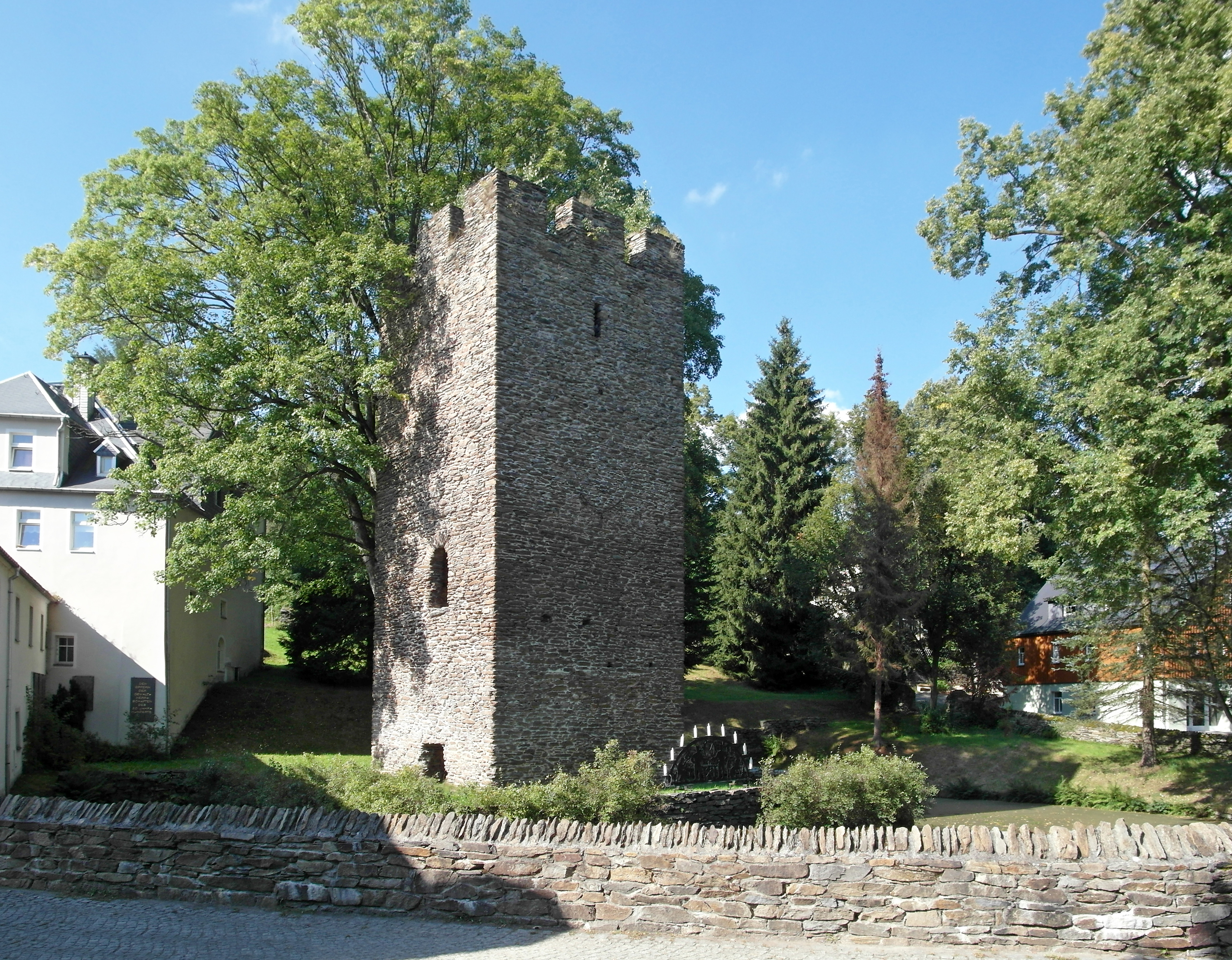 05.09.2017 09468 Tannenberg, Rittergut (GMP: 50.606096,12.947896). Der Paßklausenturm (GMP: 50.606310,12.948486) ist der Bergfried einer Wasserburg[SAM1808.JPG]20170905520DR.JPG(c)Blobelt